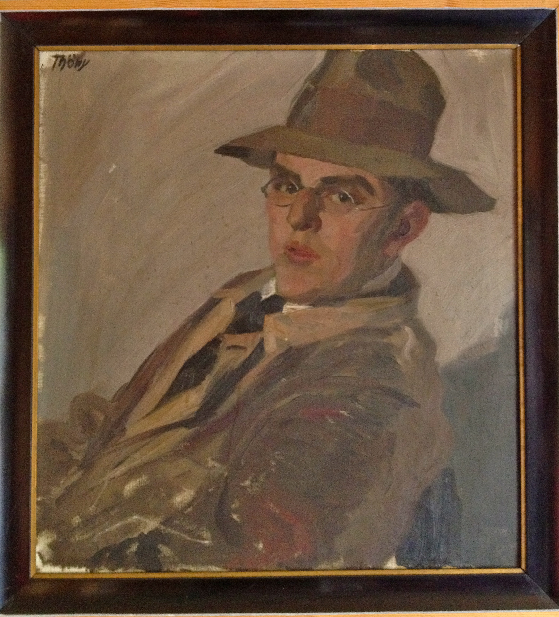 gemalt von seinem Malerfreund Thöny